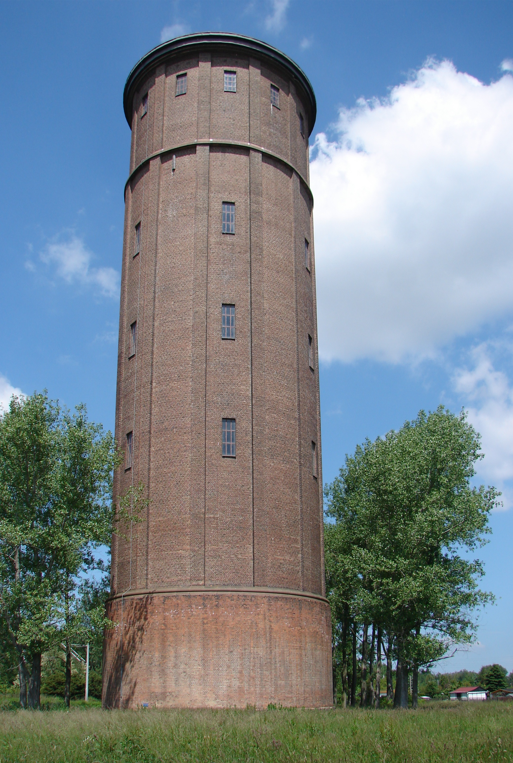 Wasserturm der Ortschaft Deutzen